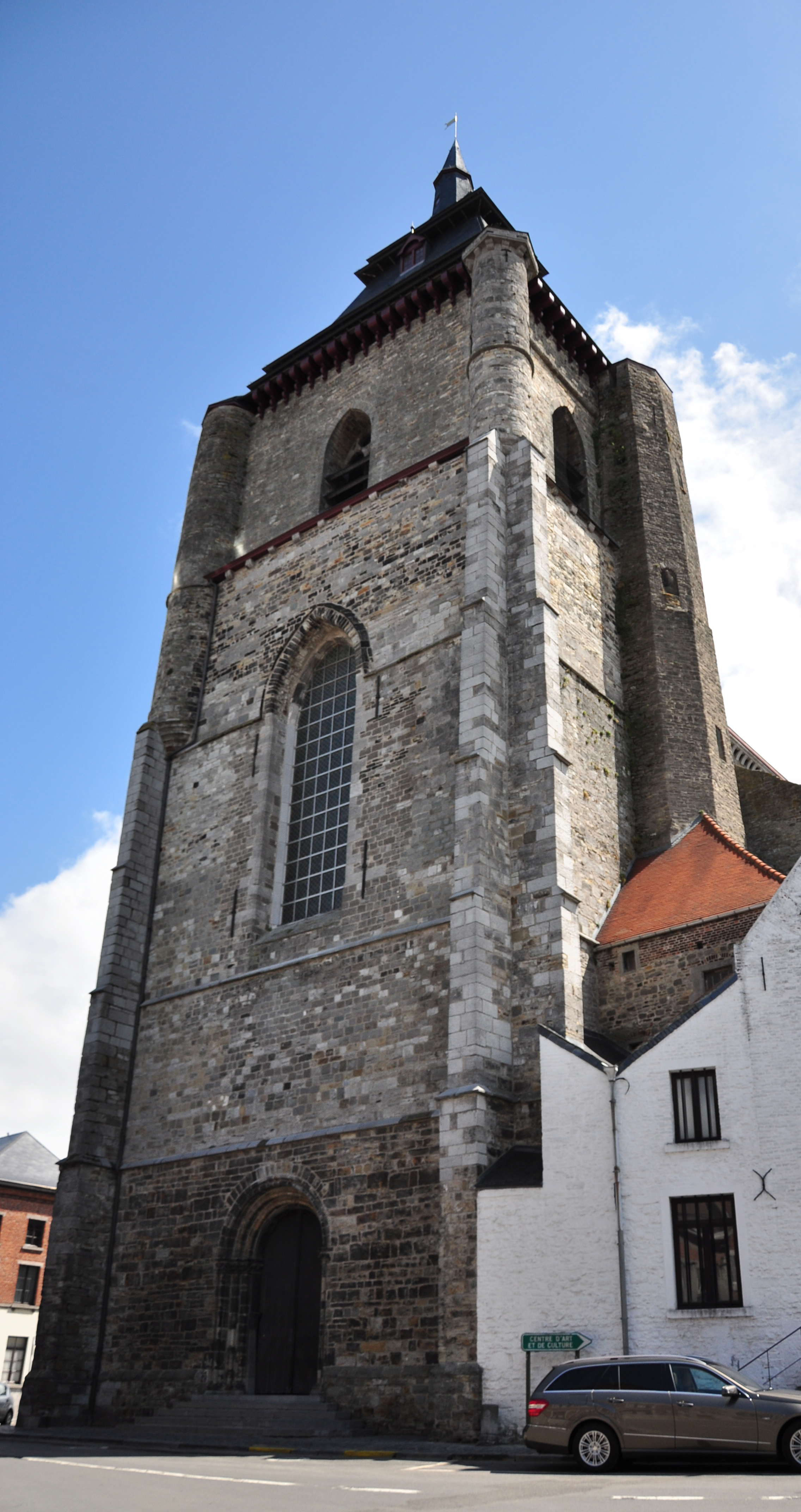 La tour occidentale de la collégiale de Soignies